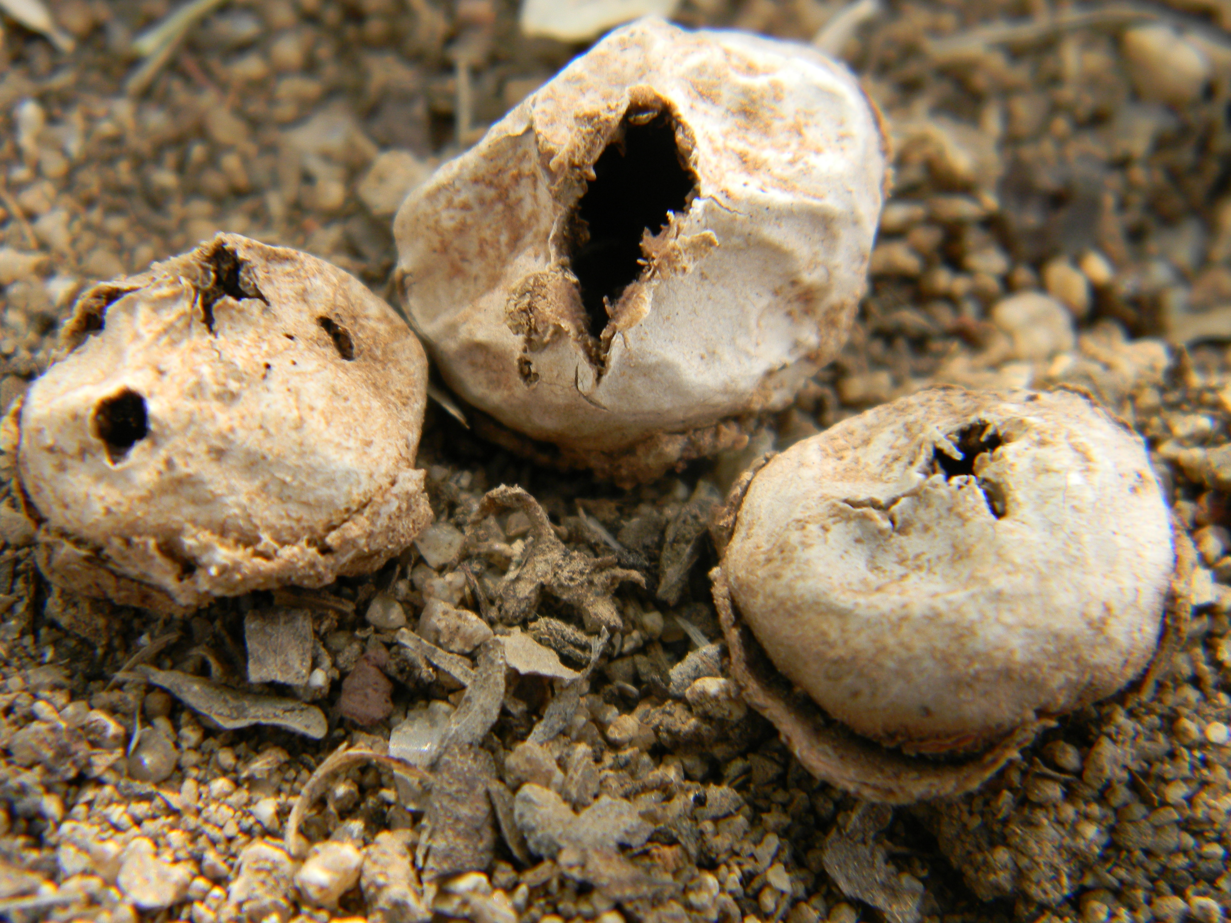 Basidiomas de Disciseda candida